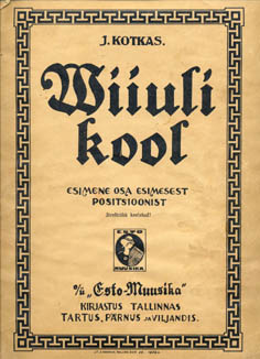 Wiiuli kool